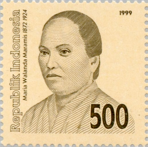 Maria Walanda Maramis